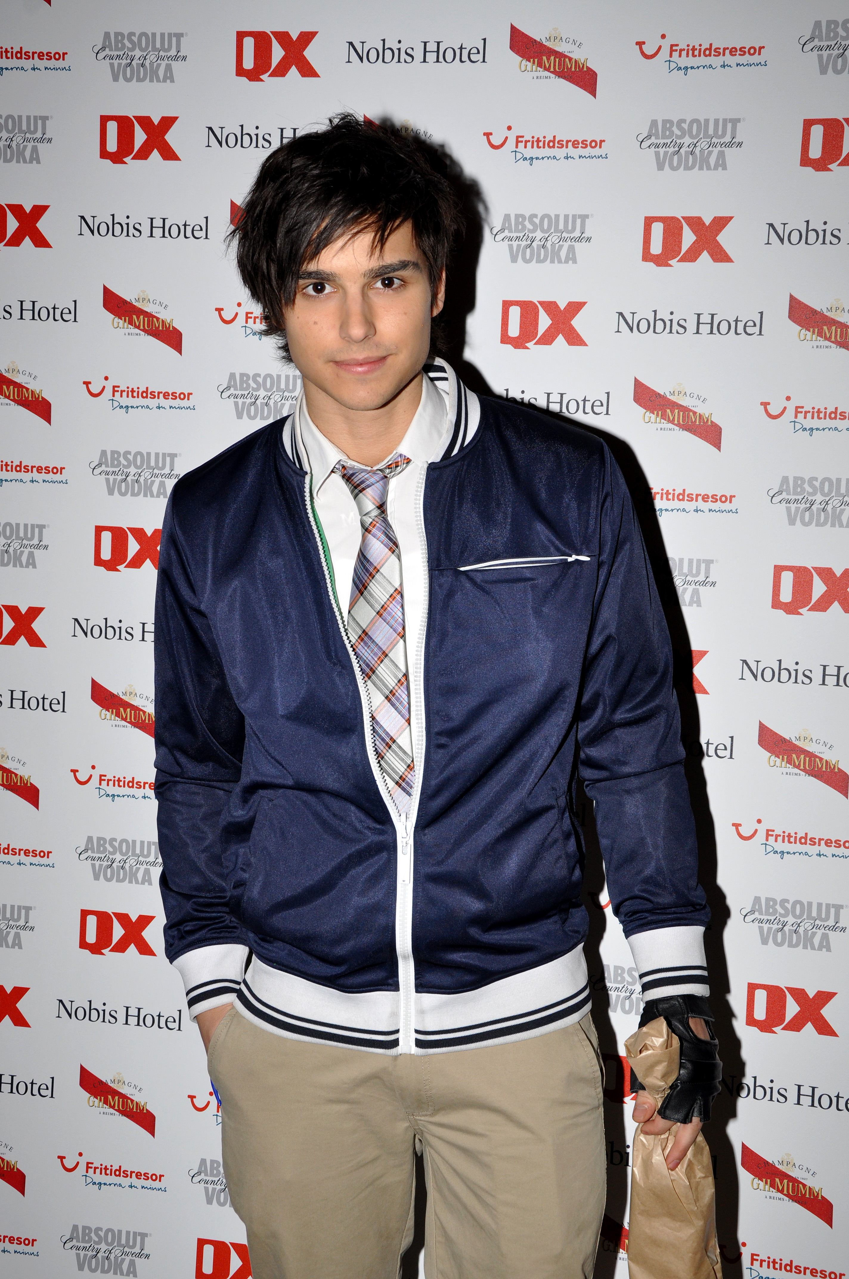 Gaygalan 2011 Eric Saade